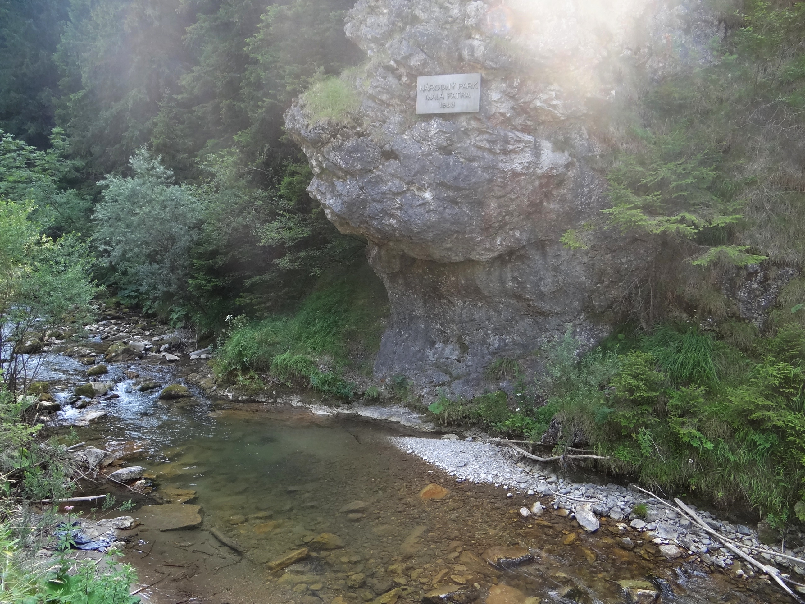 Vrátňanka pod Chlebom